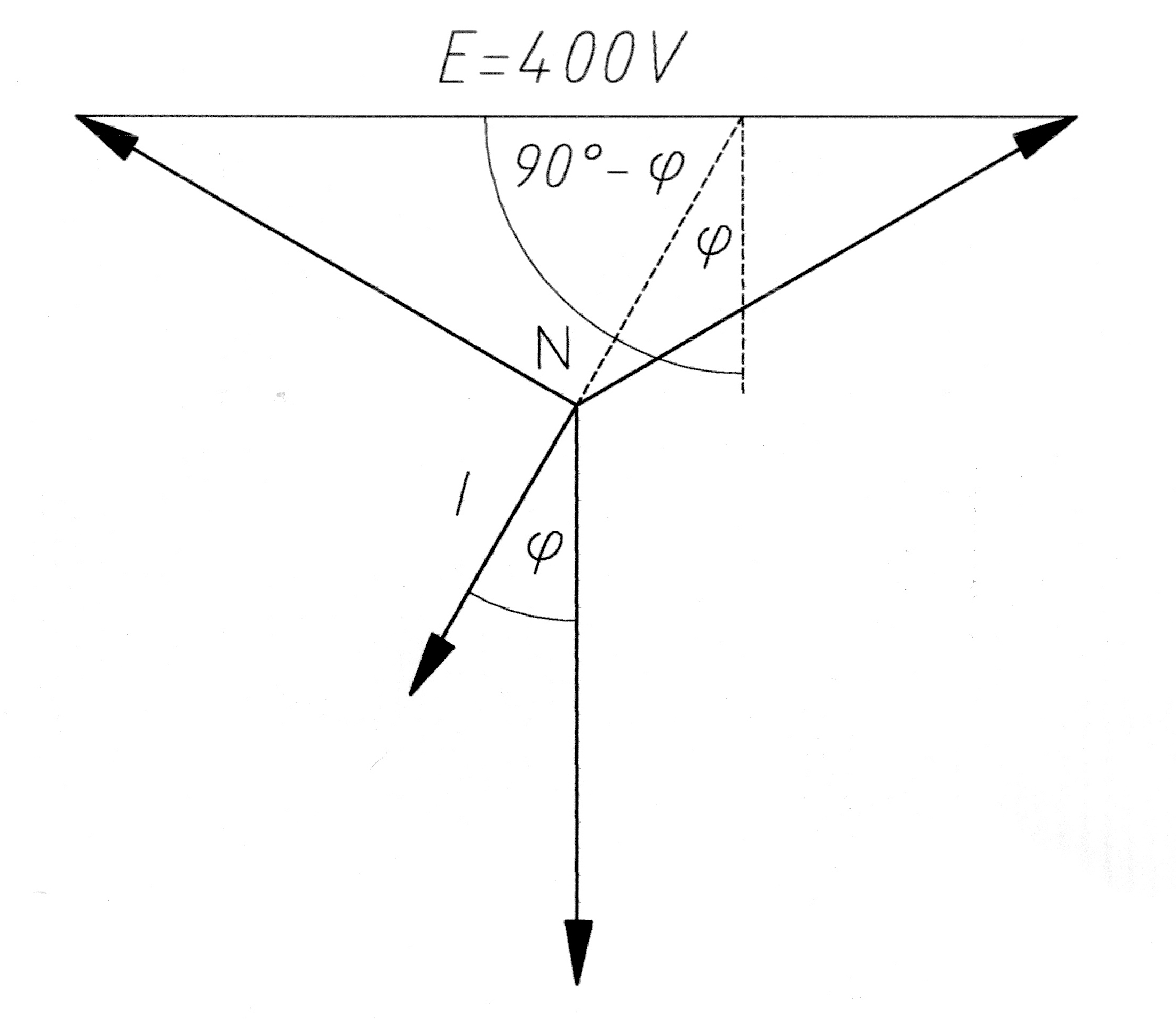 Rech-fogó cosphy mérés értelmezése háromfázisú körben